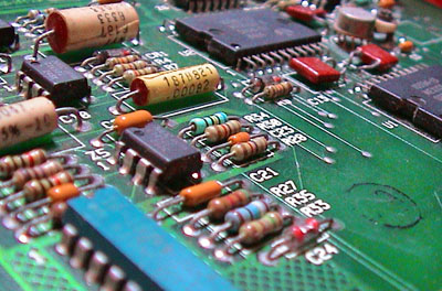 Electronic Circuit